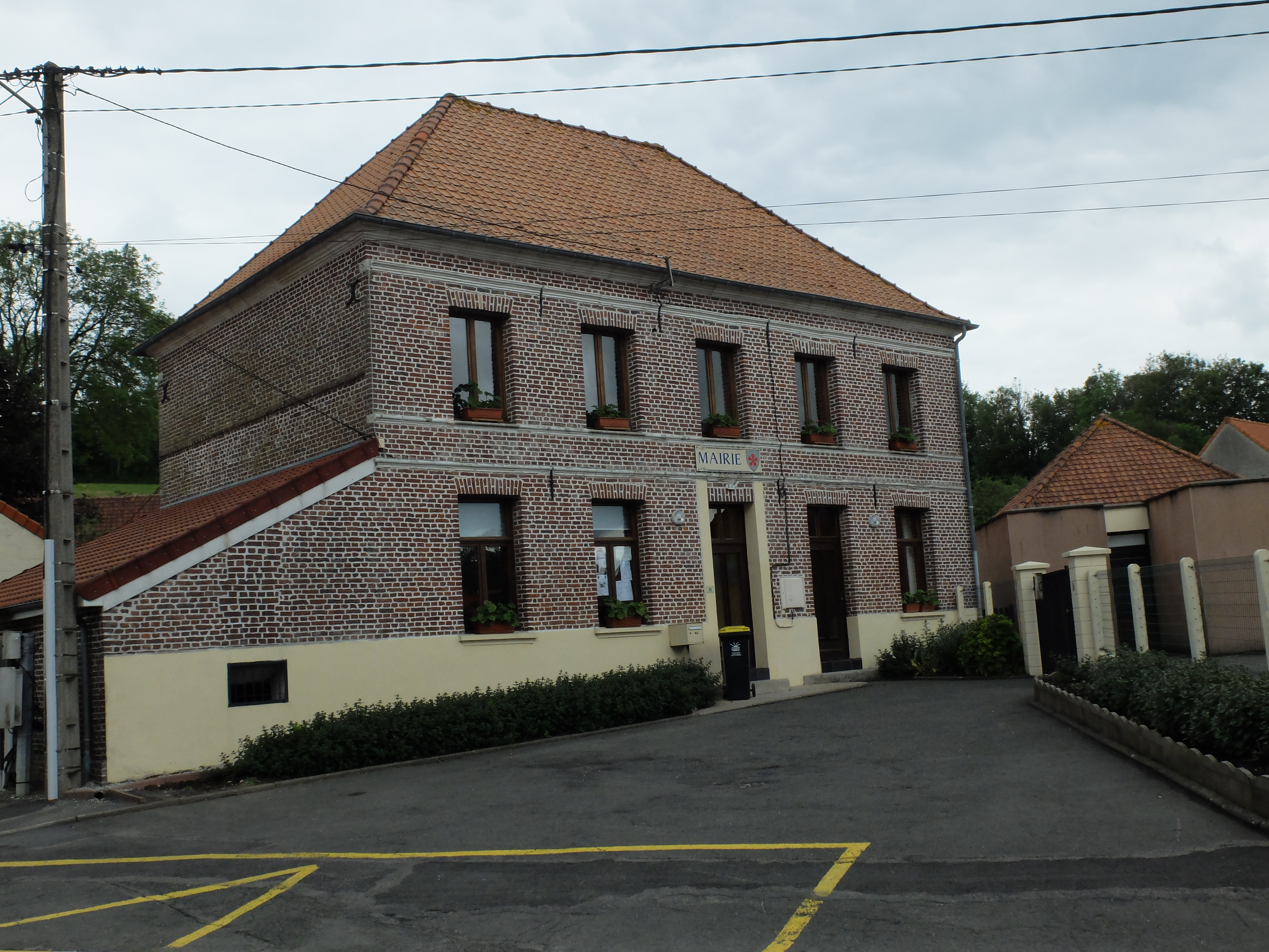 Vue de la mairie de Seninghem.